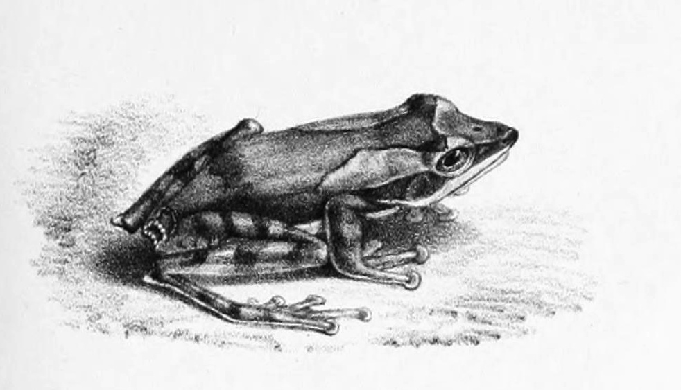 Polypedates eques